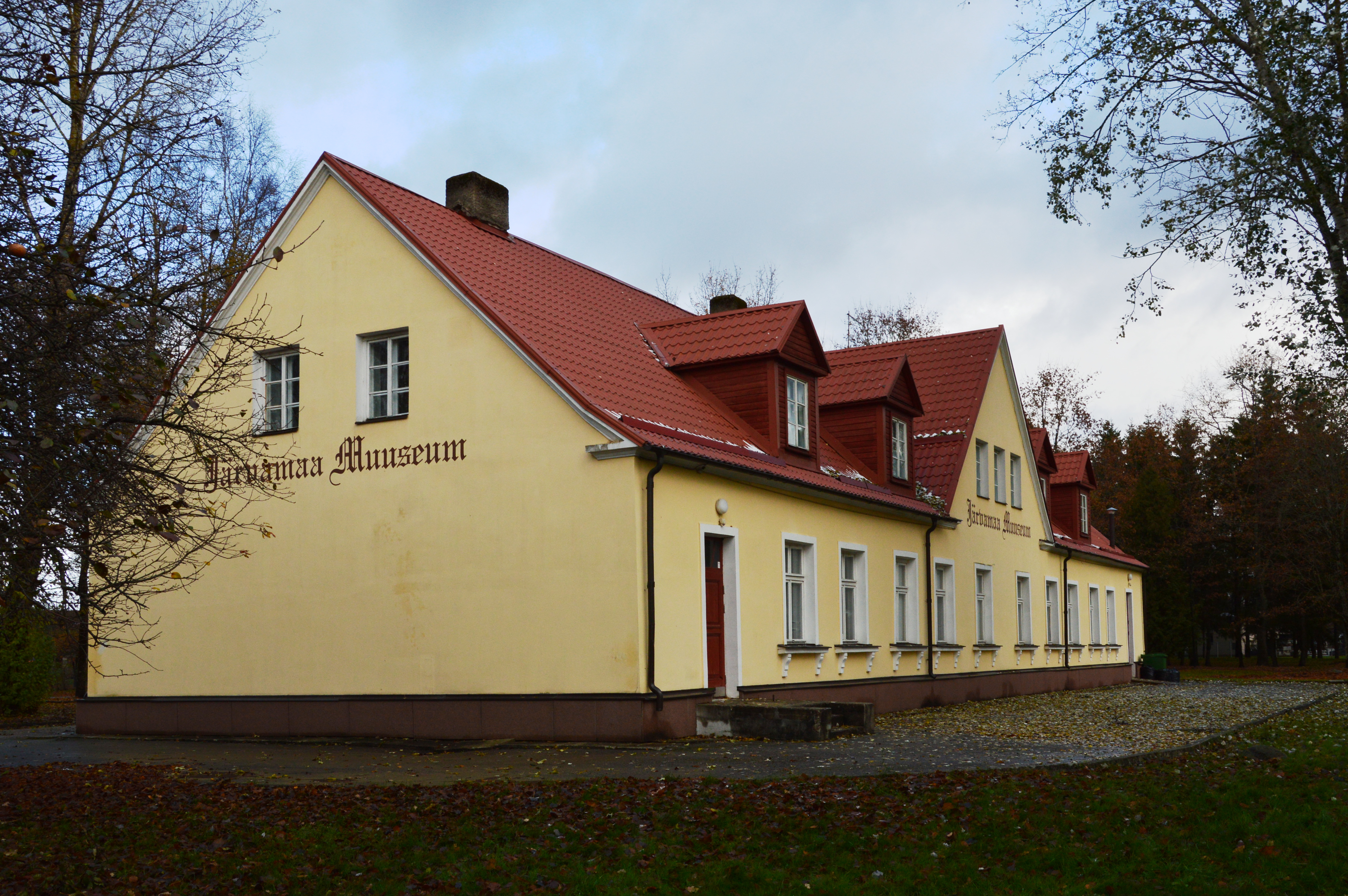 Järvamaa Muuseum, Lembitu puiestee 5.